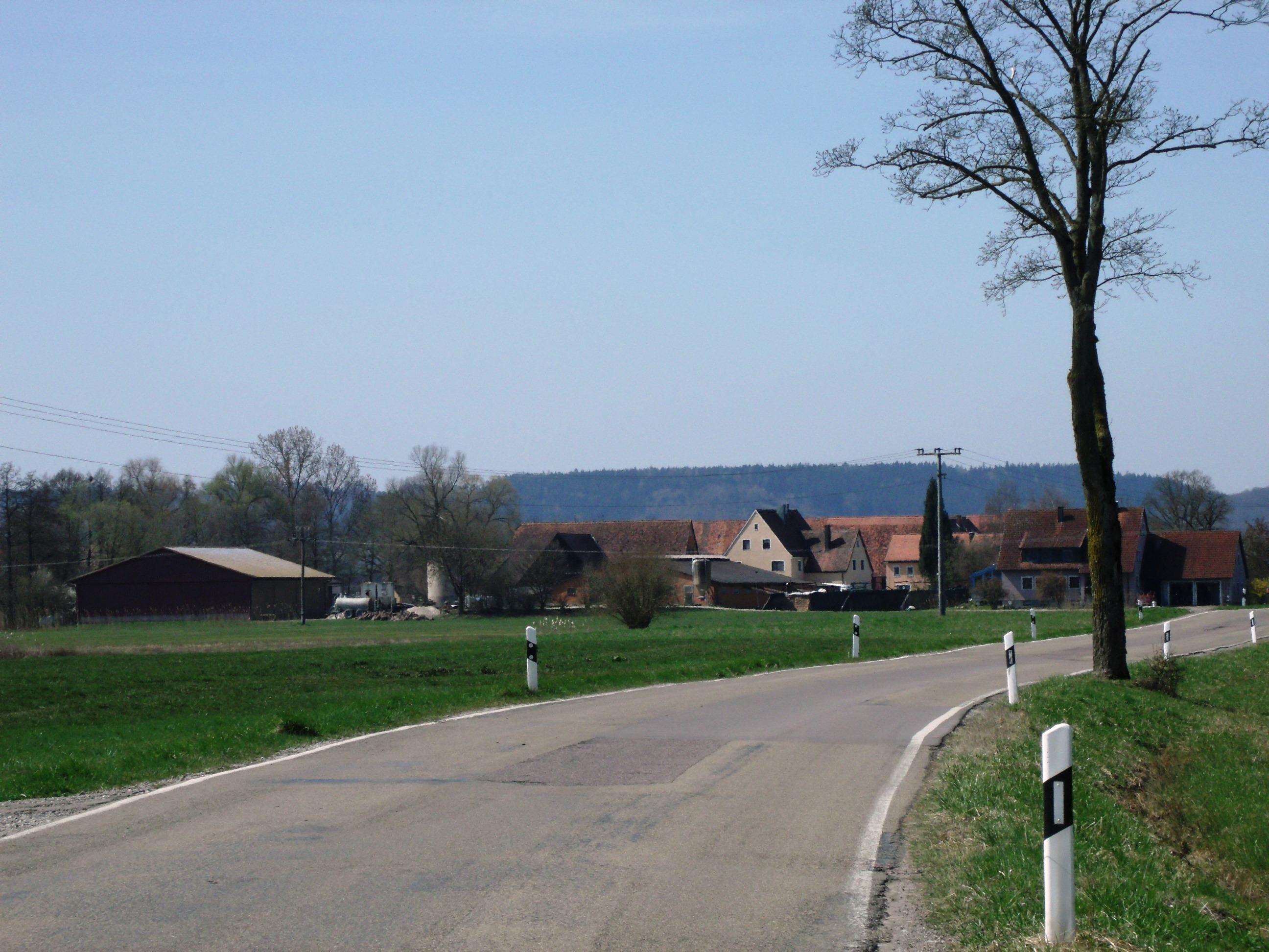 Erlbach, Ortsteil von Leutershausen im Landkreis Ansbach